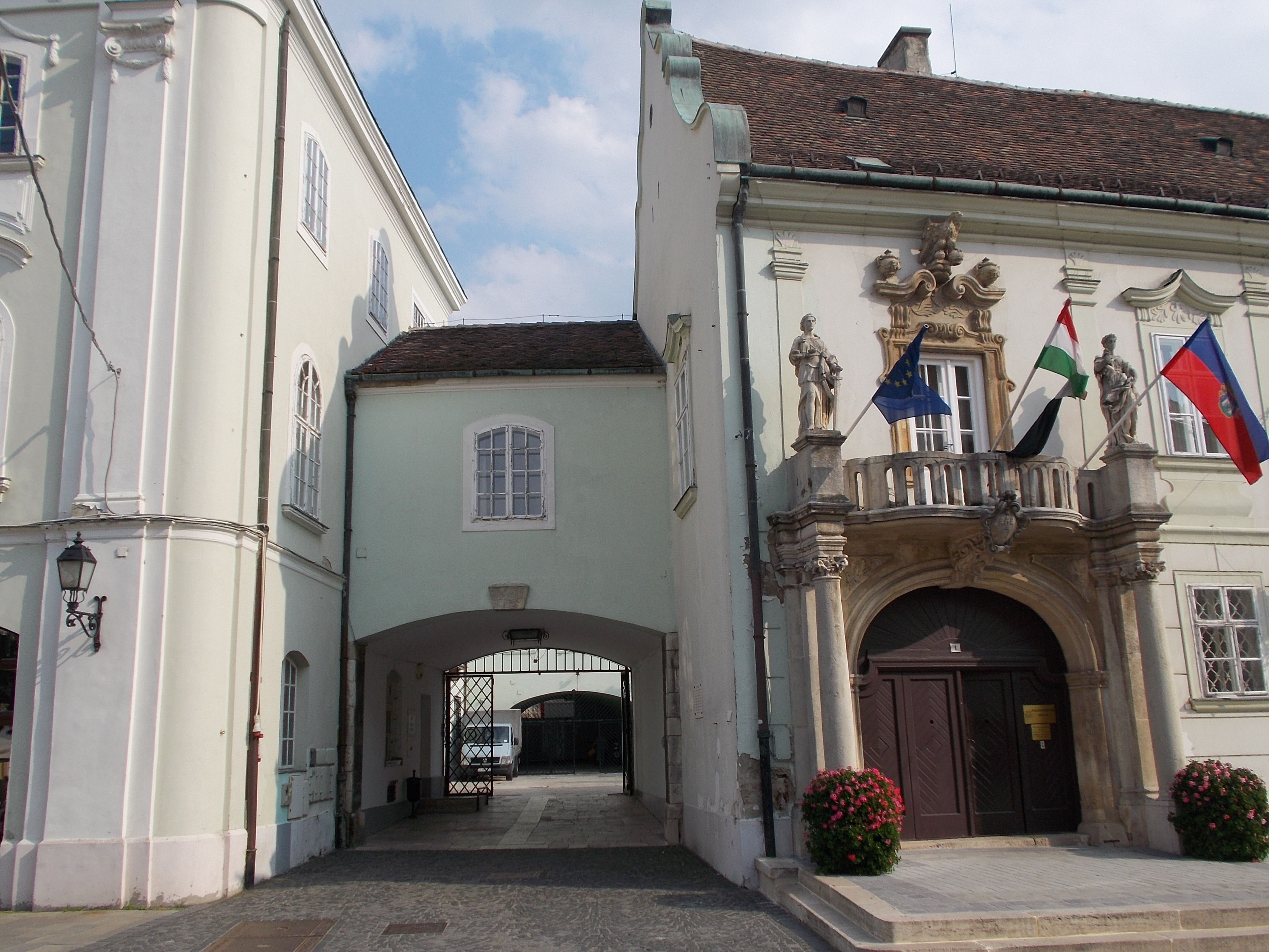 Városháza. Barokk műemlék ház ID 3915, északeleti része. Összekötő folyosó 'híd' a Zichy-palota műemlék épületével ID 3843. Az északi összekötő szárny udvari homlokzatának középtengelyének kis íves záródású, kagyló és volutatagos fülkéjébe Mária szobra látható.- Fejér megye, Székesfehérvár, Belváros, Városház tér 1., Kossuth u. 1. This is a photo of a monument in Hungary. Identifier: 3915 This is a photo of a monument in Hungary. Identifier: 3843